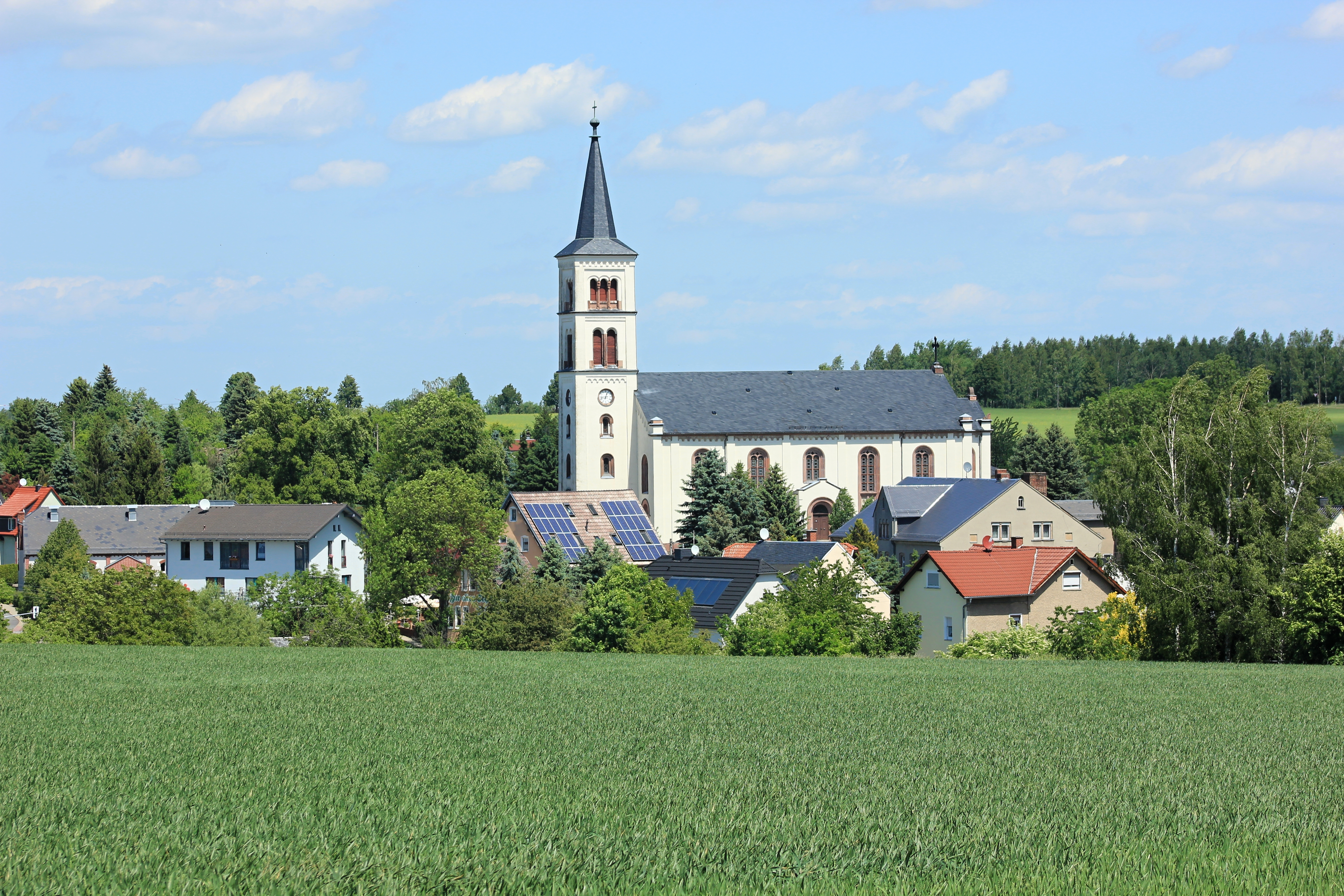 Kirche in Callenberg. Sachsen.